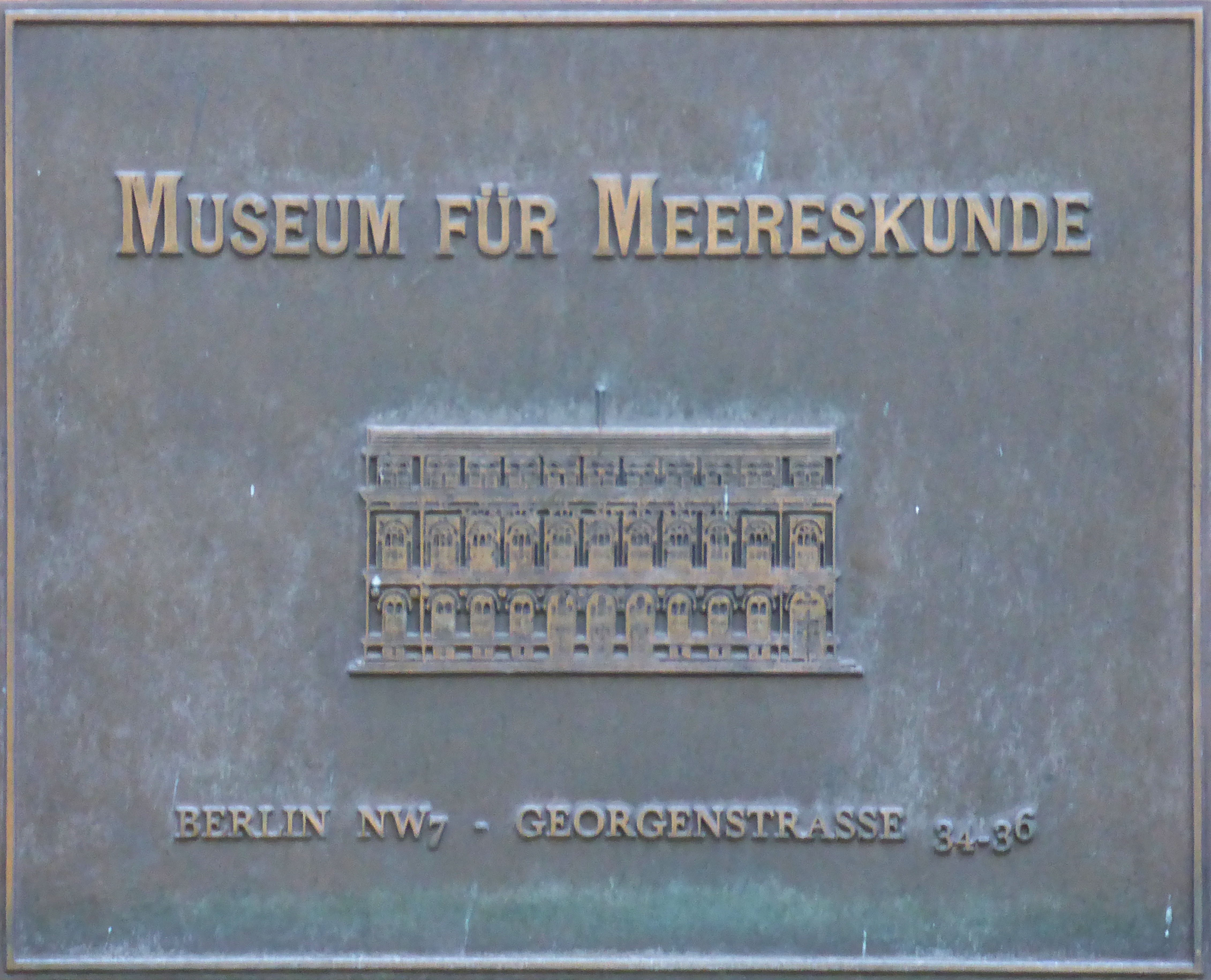 Bronzeschild Museum für Meereskunde an der Fassade des Deutschen Technikmuseum Berlin. Wikipedianische KulTour am 10. Oktober 2015 in der Ausstellung des Museums.